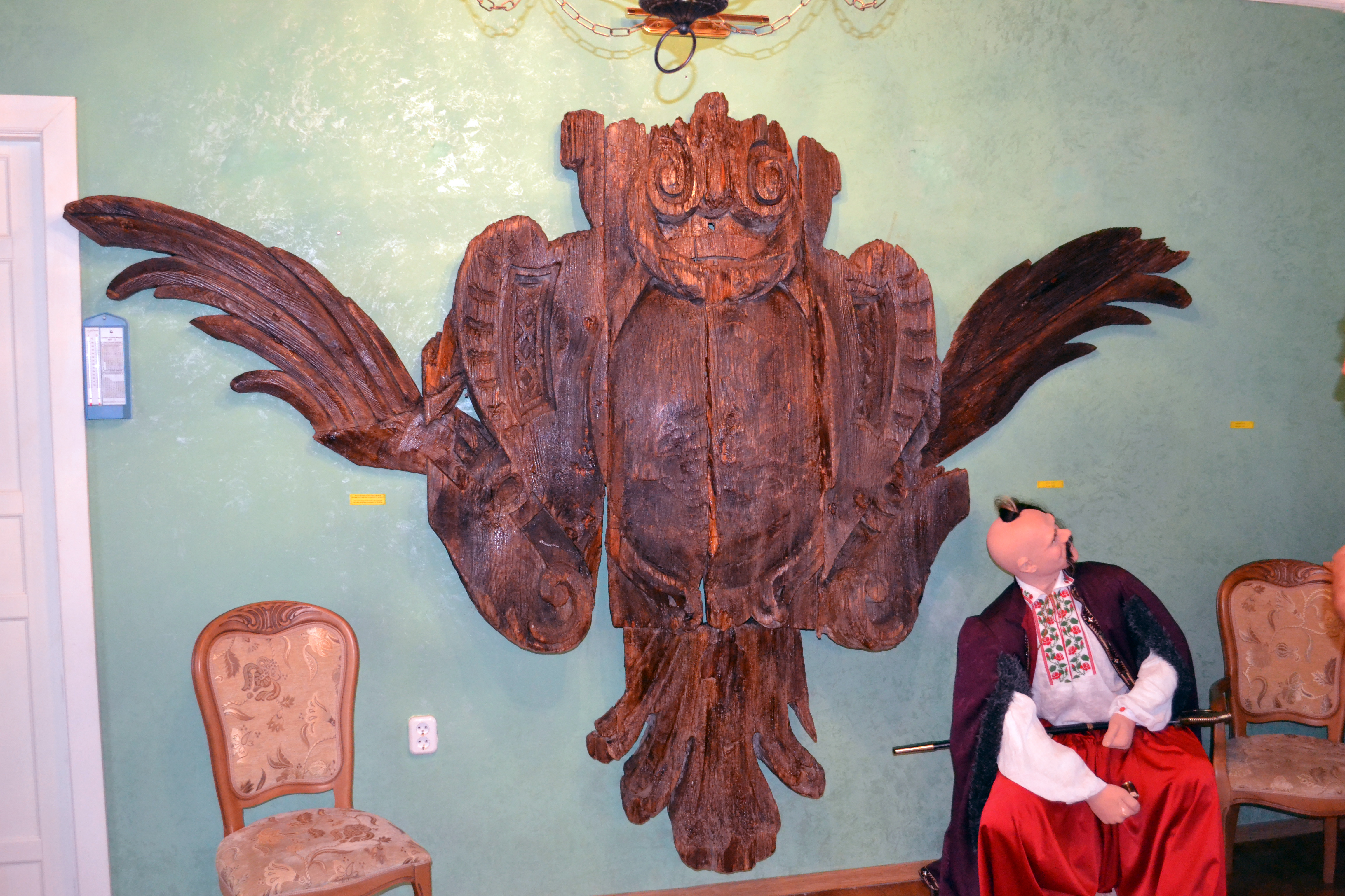 Беларуская (тарашкевіца): Драўляны шчыт (магчыма, з вэнзэлем Сапегаў), які вісеў над уваходнай брамай палацу. Пасьля рэстаўрацыі на гэтым месцы павесілі «Пагоню». This is a photo of Belarusian heritage monument. Reference number: 112Г000640 ( WLM)